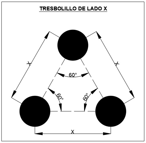 Disposición al tresbolillo acotada referencialmente